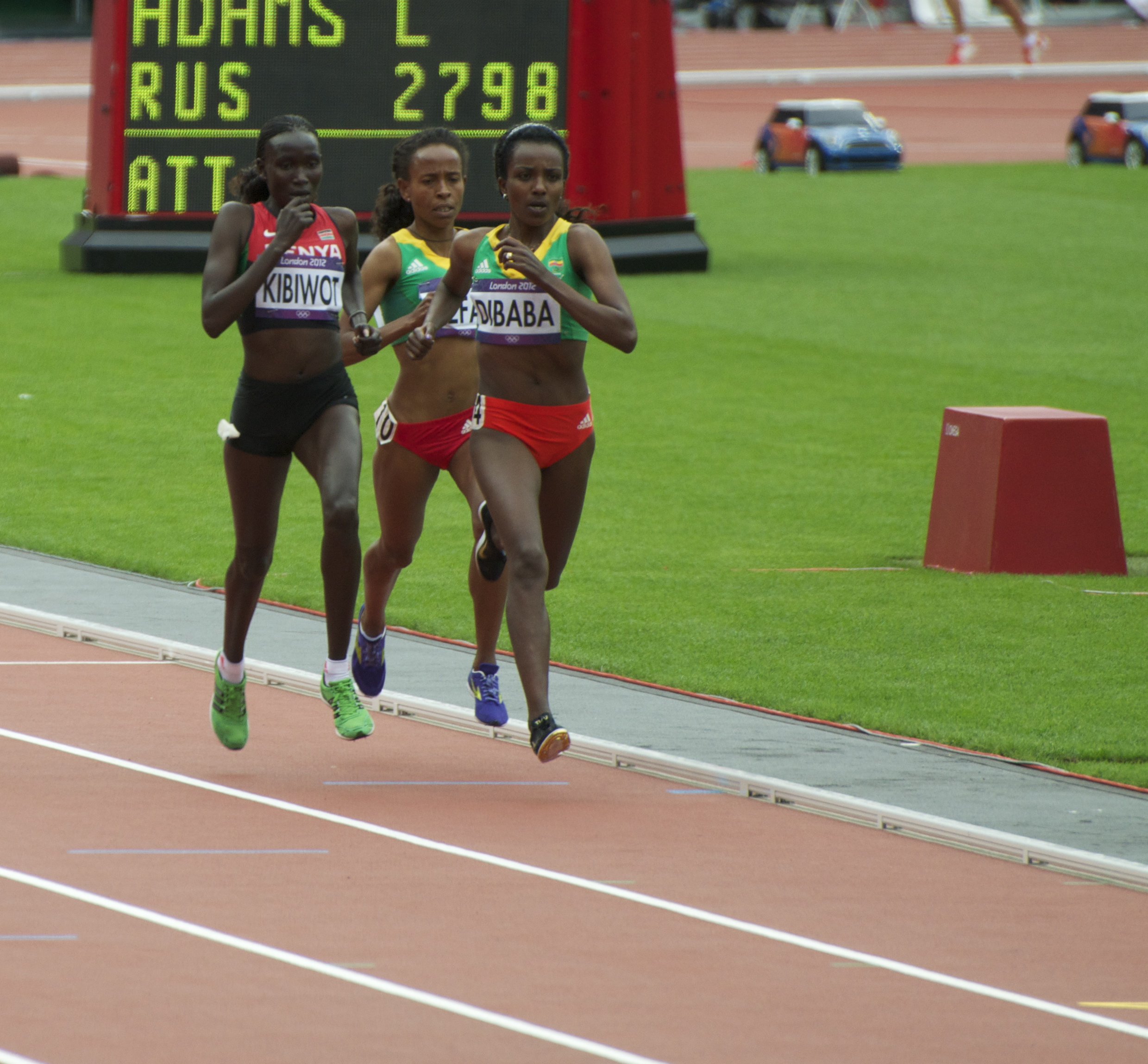 Women's 5000m, Viola Jelagat Kibiwot, Meseret Defar, Tirunesh Dibaba